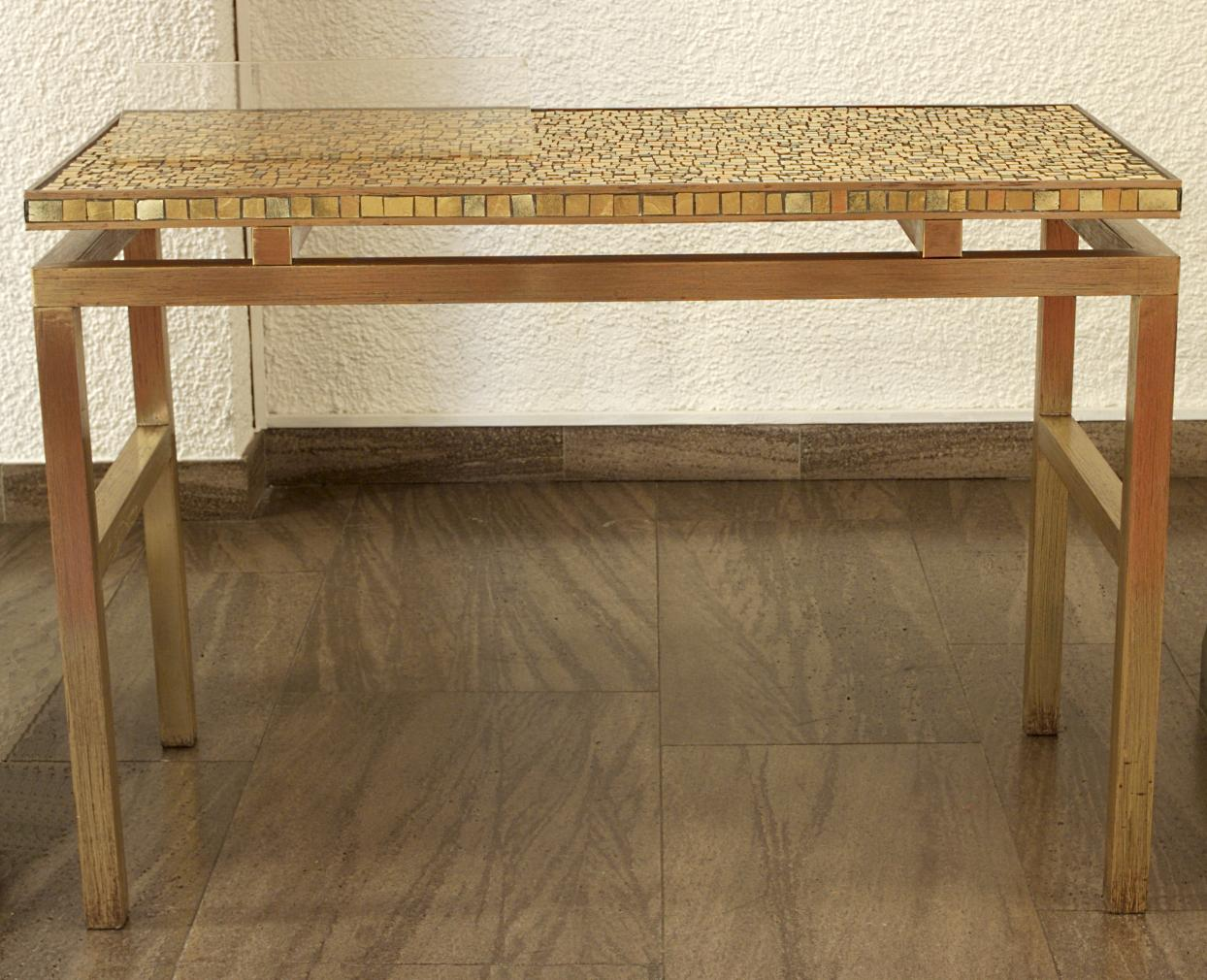 Kredenztisch (Mater Dolorosa)